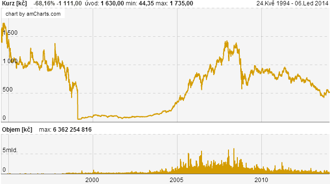 Akcie ČEZ - Graf vývoje kurzu na Burze Praha.